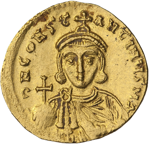 Солид. Лев III Исавр и Константин V. Ок. 720—725 гг. (реверс). Погрудный портрет Константина V (сын Льва III), в фас; без бороды, в короне и хламиде; в правой руке держава с крестом, в левой — акакия.